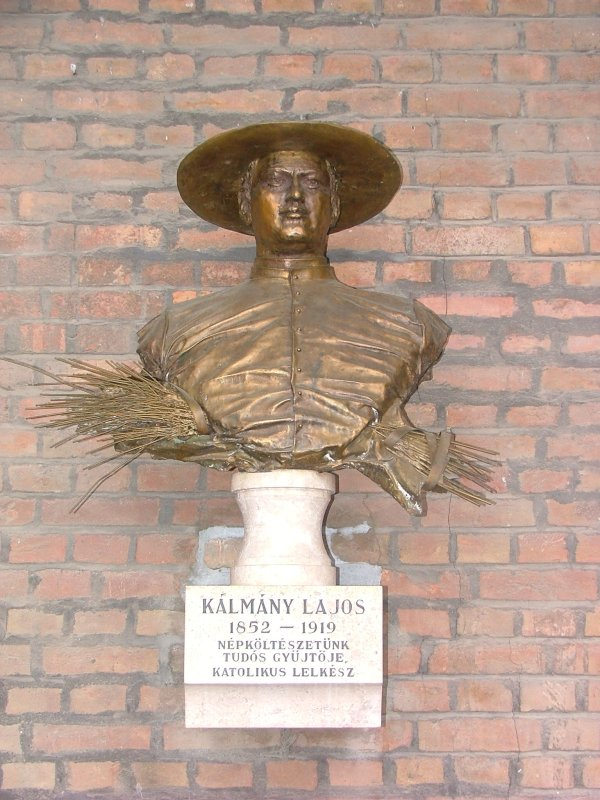 Kálmány Lajos szobra Szegeden